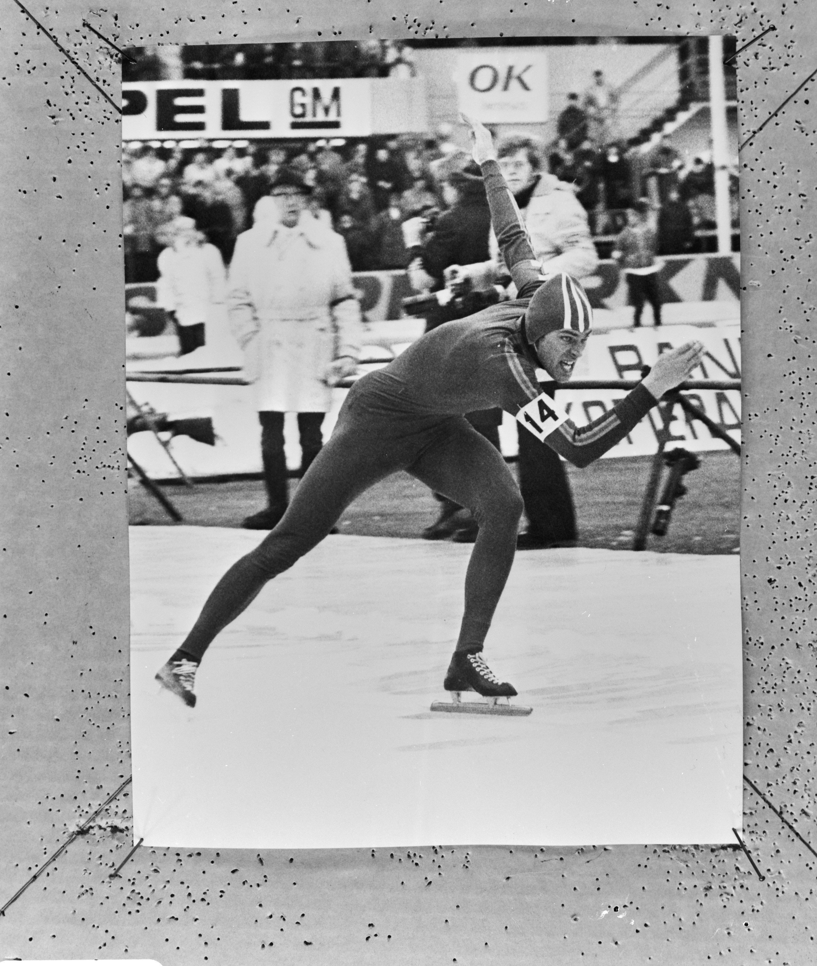 Collectie / Archief : Fotocollectie Anefo Reportage / Serie : [ onbekend ] Beschrijving : Wereldkampioenschappen schaatsen heren, Gothenburg; Ard Schenk in aktie Annotatie : Repronegatief Datum : 14 februari 1971 Locatie : Göteborg Trefwoorden : SCHAATSEN, sport, wereldkampioenschappen Persoonsnaam : Schenk, Ard Fotograaf : HT-Bild Auteursrechthebbende : Nationaal Archief Materiaalsoort : Negatief (zwart/wit) Nummer archiefinventaris : bekijk toegang 2.24.01.04 Bestanddeelnummer : 924-2676